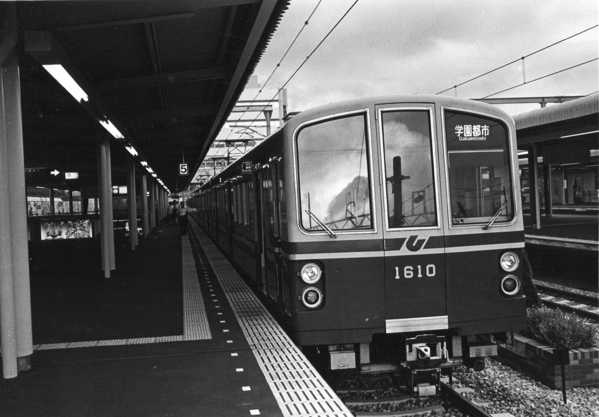 谷上駅旧配置時の5番線ホーム